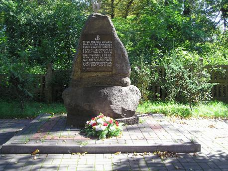 Tablica obok budynku stacyjnego w Celestynowie, upamiętniająca odbicie więźniów 20 maja 1943 r.